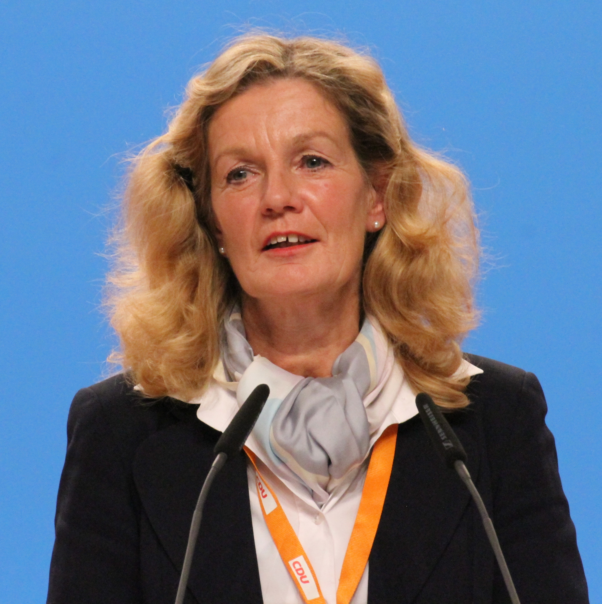 Elisabeth Heister-Neumann auf dem CDU Bundesparteitag Dezember 2014 in Köln